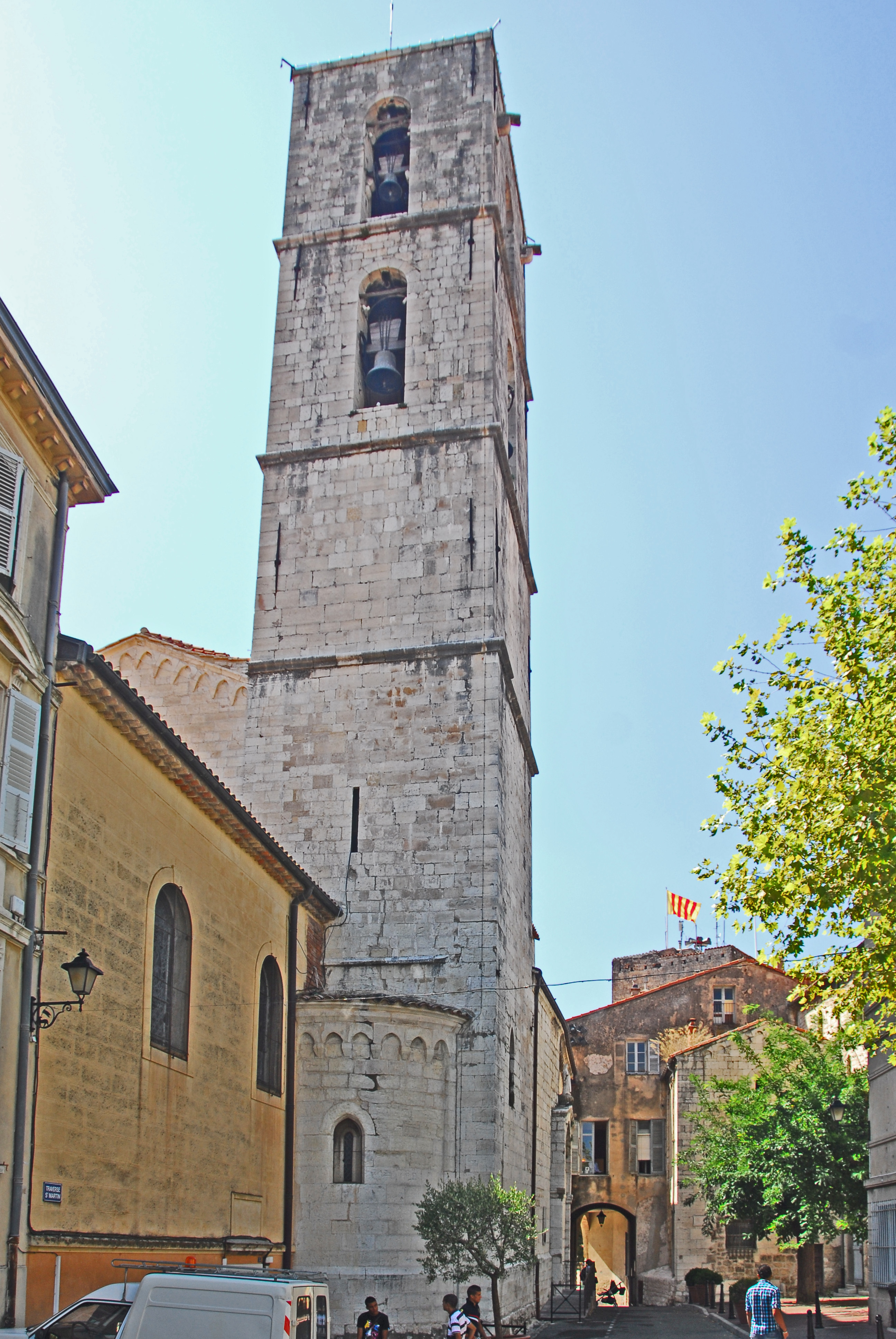 Kathédrale Notre-Dame-du-Puy von Grasse, Glockenturm mit Chor von NO